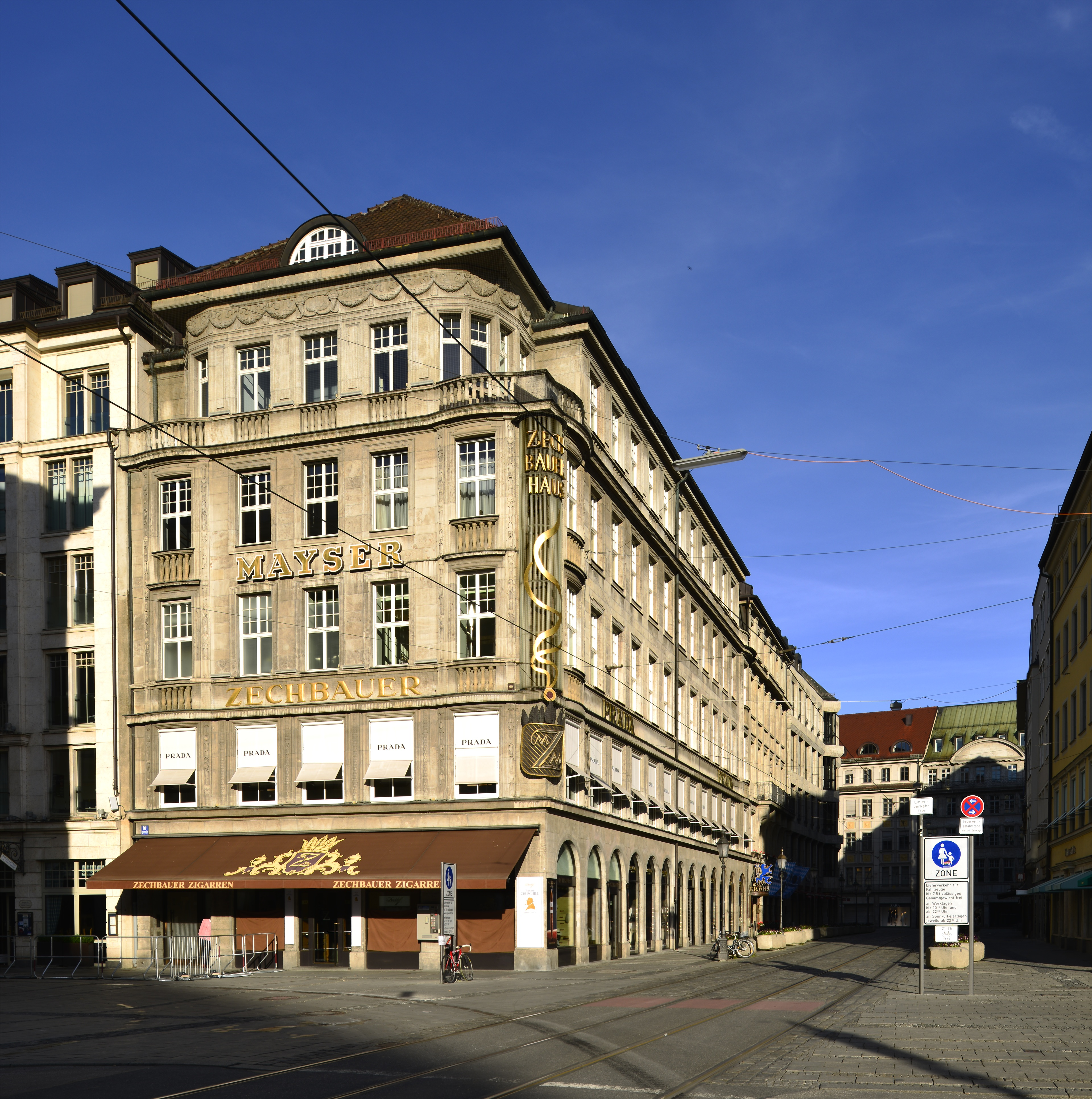 München, Fassadenansicht Residenzstraße 10. Zechbauerhaus.